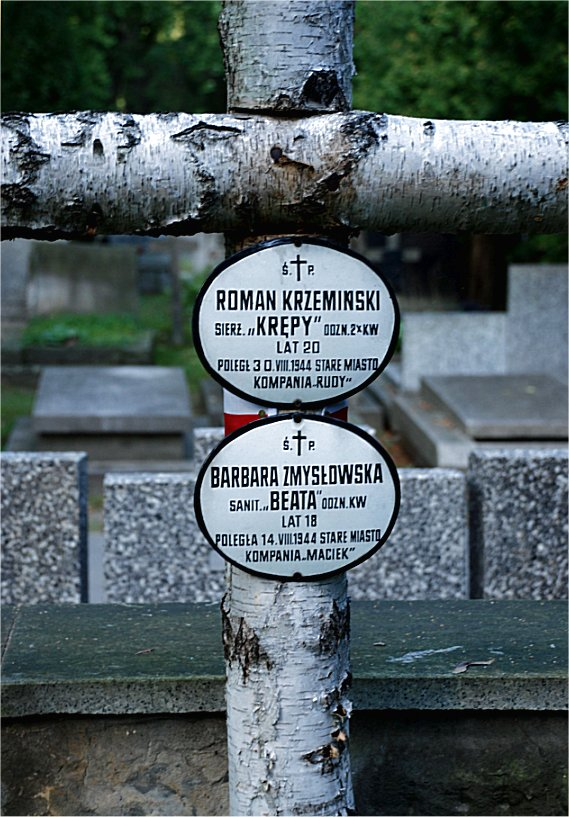 Nad grobem na Powązkach Wojskowych w Warszawie